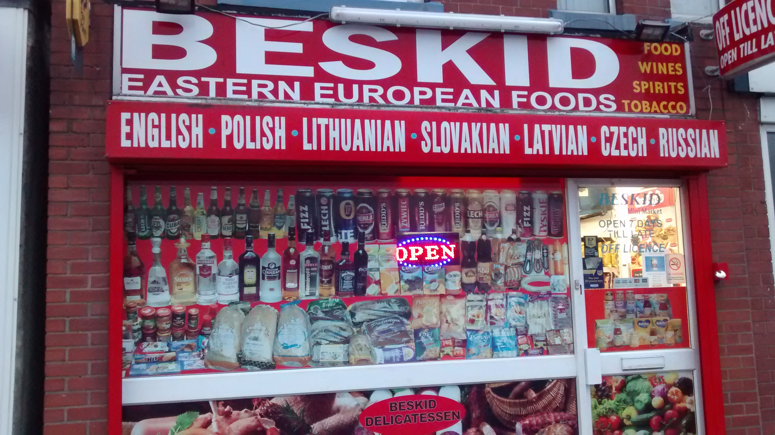 Polski sklep na ul. Fosse Road North